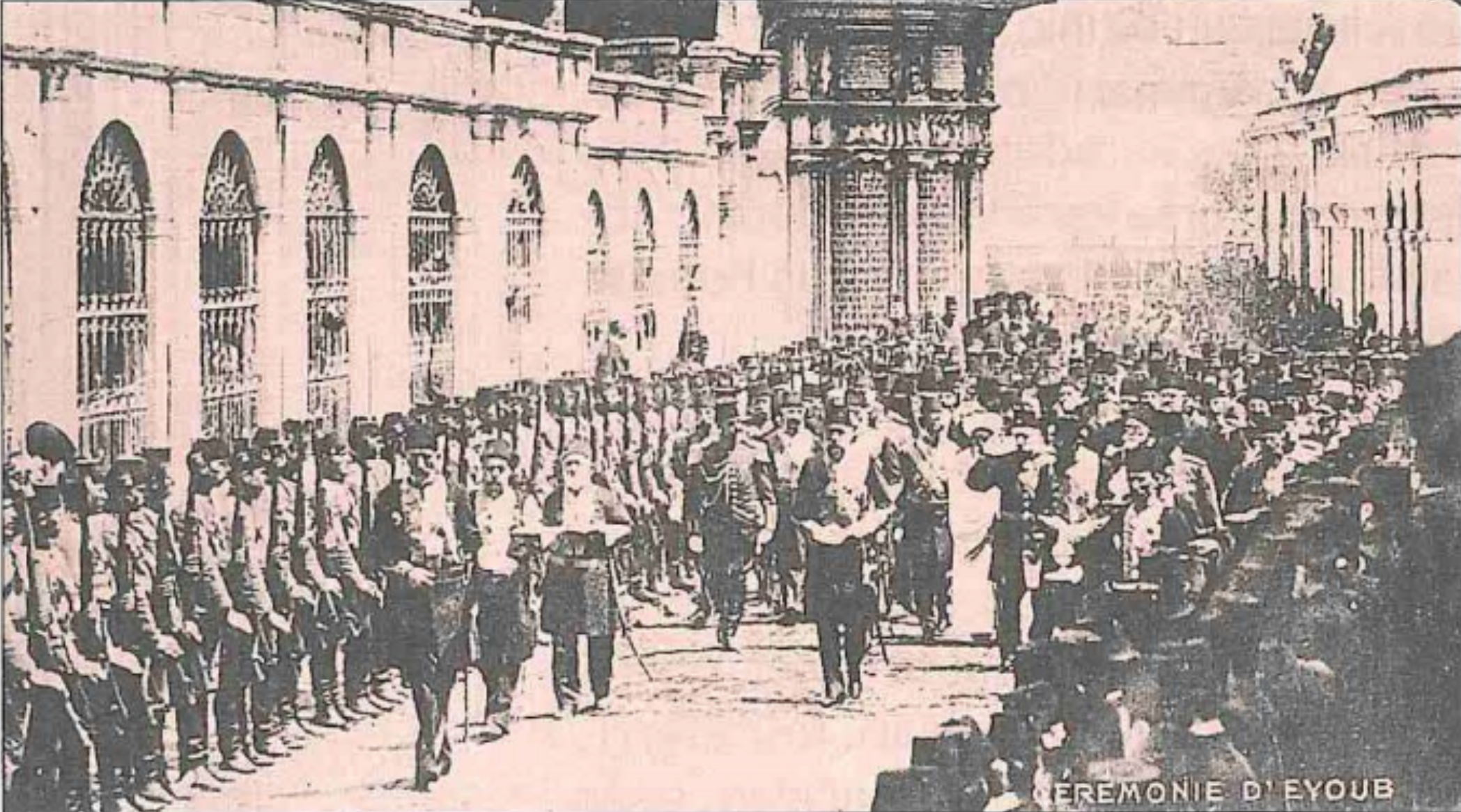 Sultan Resad'ın kılıç kuşanma töreni için Eyüp' e giden heyet i gösteren bir fotoğraf